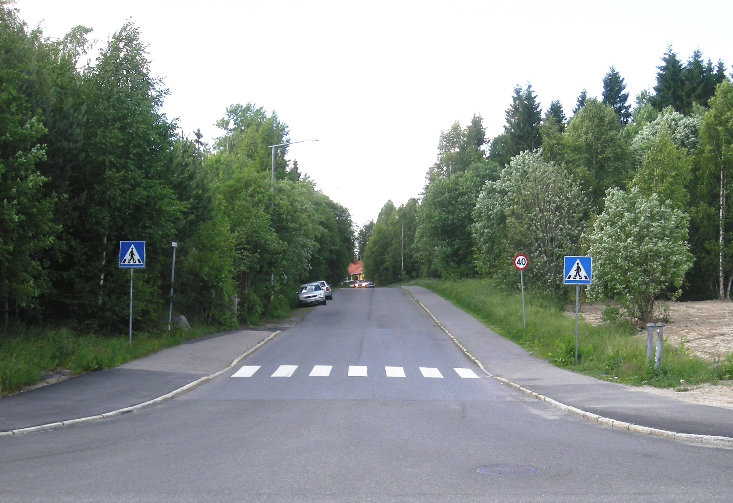 Gamle Bygdevei i enden mot Mortensrudveien